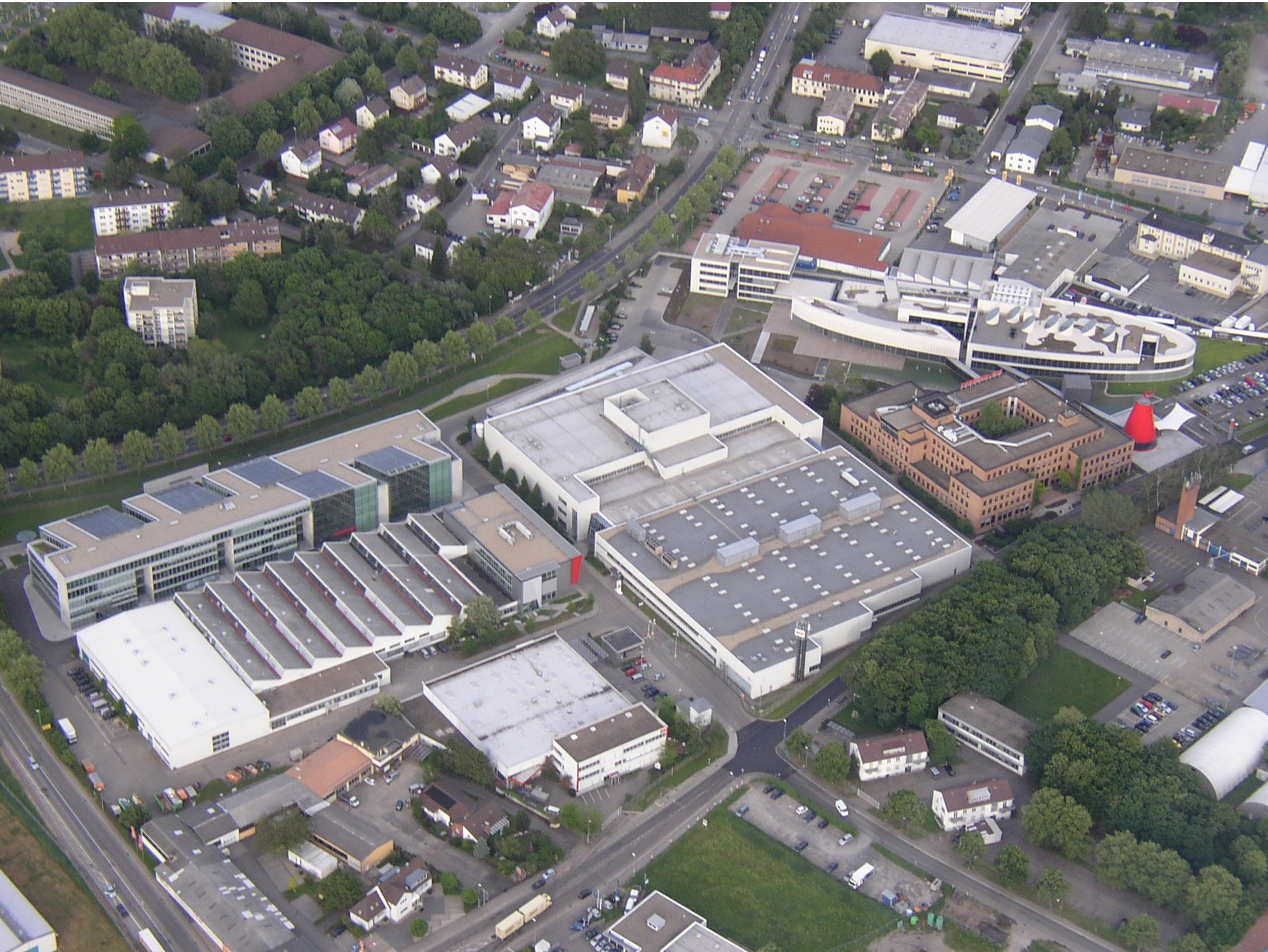 Luftaufnahme des Hauptsitzes von SEW-Eurodrive in Bruchsal